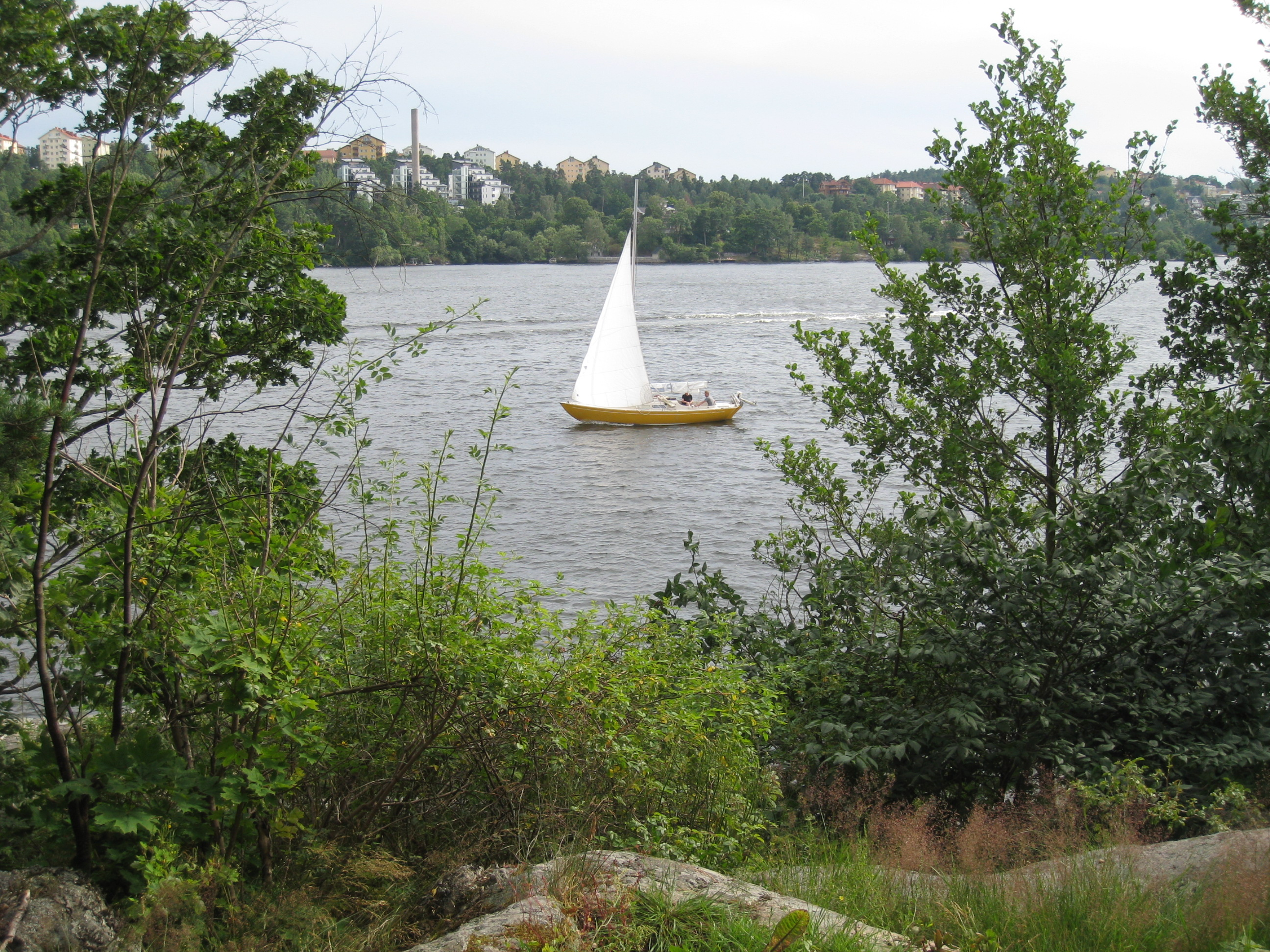 Ålstensskogens natur vid Mälaren i stadsdelen Ålsten i södra Bromma, väster om Stockholm.